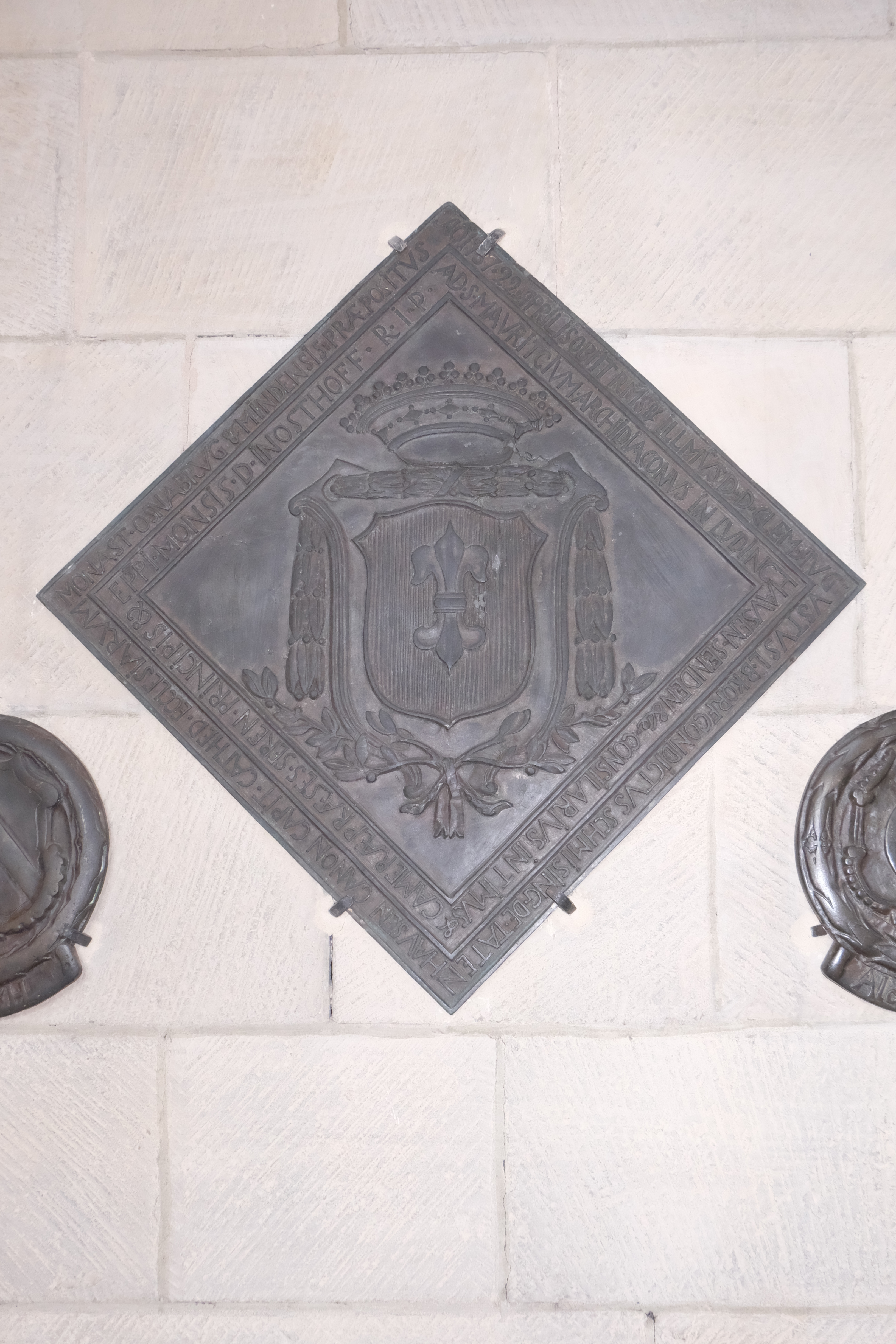 Wappen der Domherrn in Münster; Grabplatte des Domherrn Clemens August von Korff gen. Schmising zu Tatenhausen